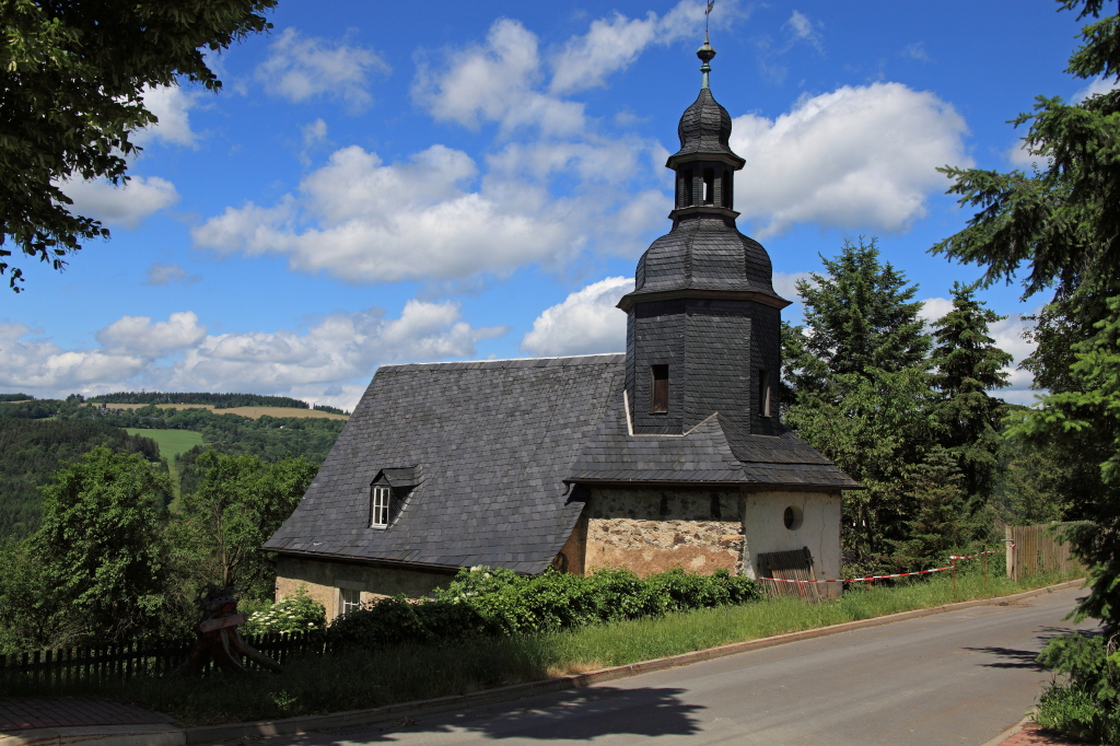 Blick von der Dorfstraße